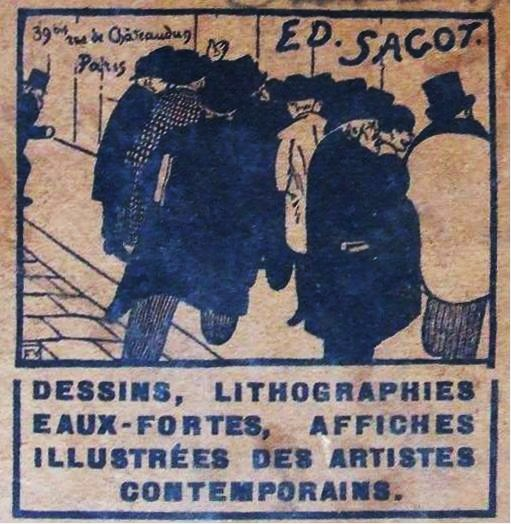 Carte de visite professionnelle du librairie et marchand d'art Edmond Sagot (Paris). Gravure sur bois. Design from Félix Vallotton, « Les amateurs d'estampes ».